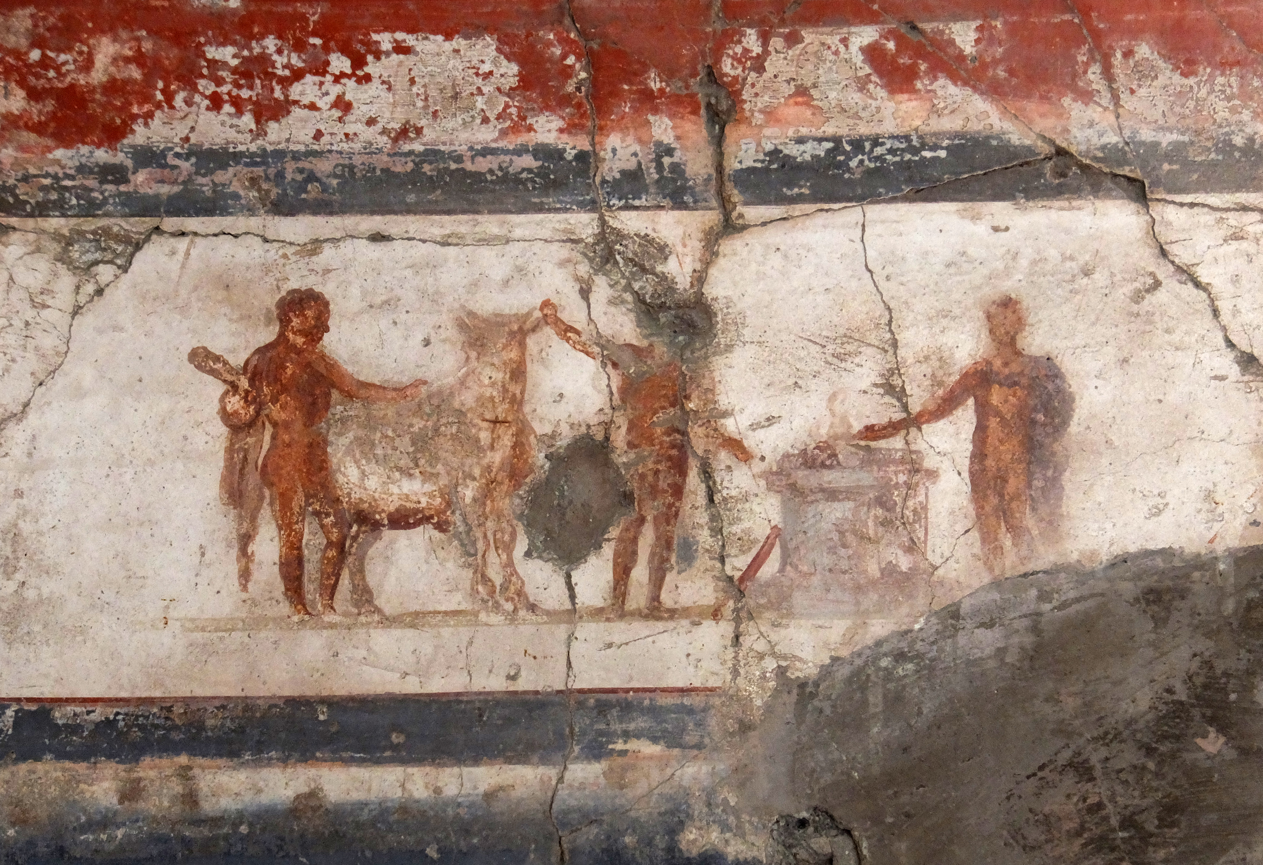 Herculaneum 81